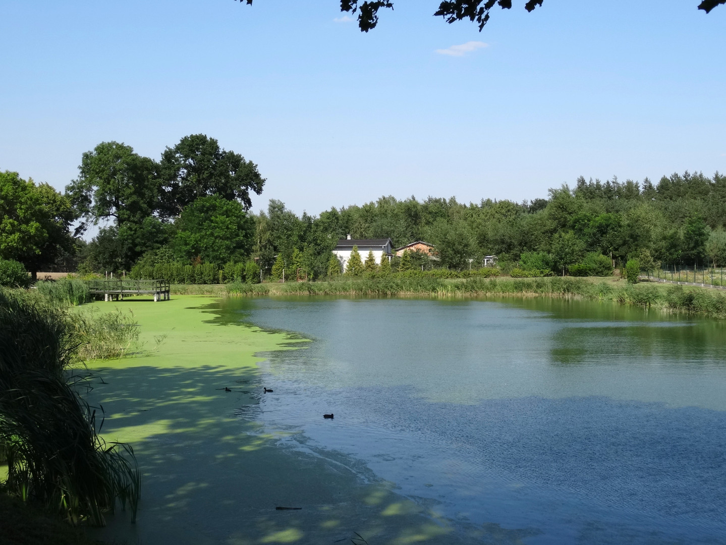 Gzin, gmina Dąbrowa Chełmińska